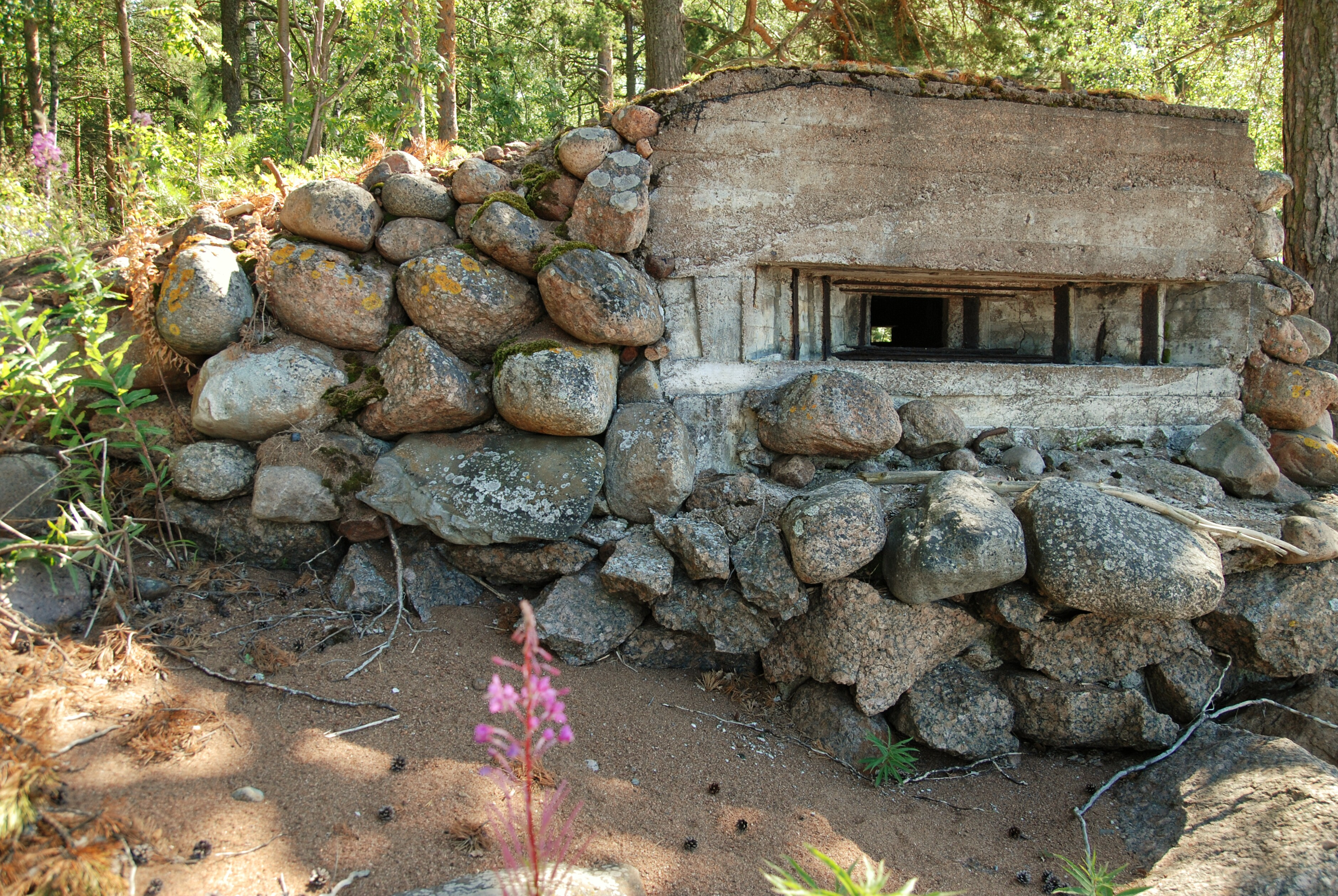 Старый финский ДОТ за бухтой Болотная на западном берегу Большого Берёзового острова